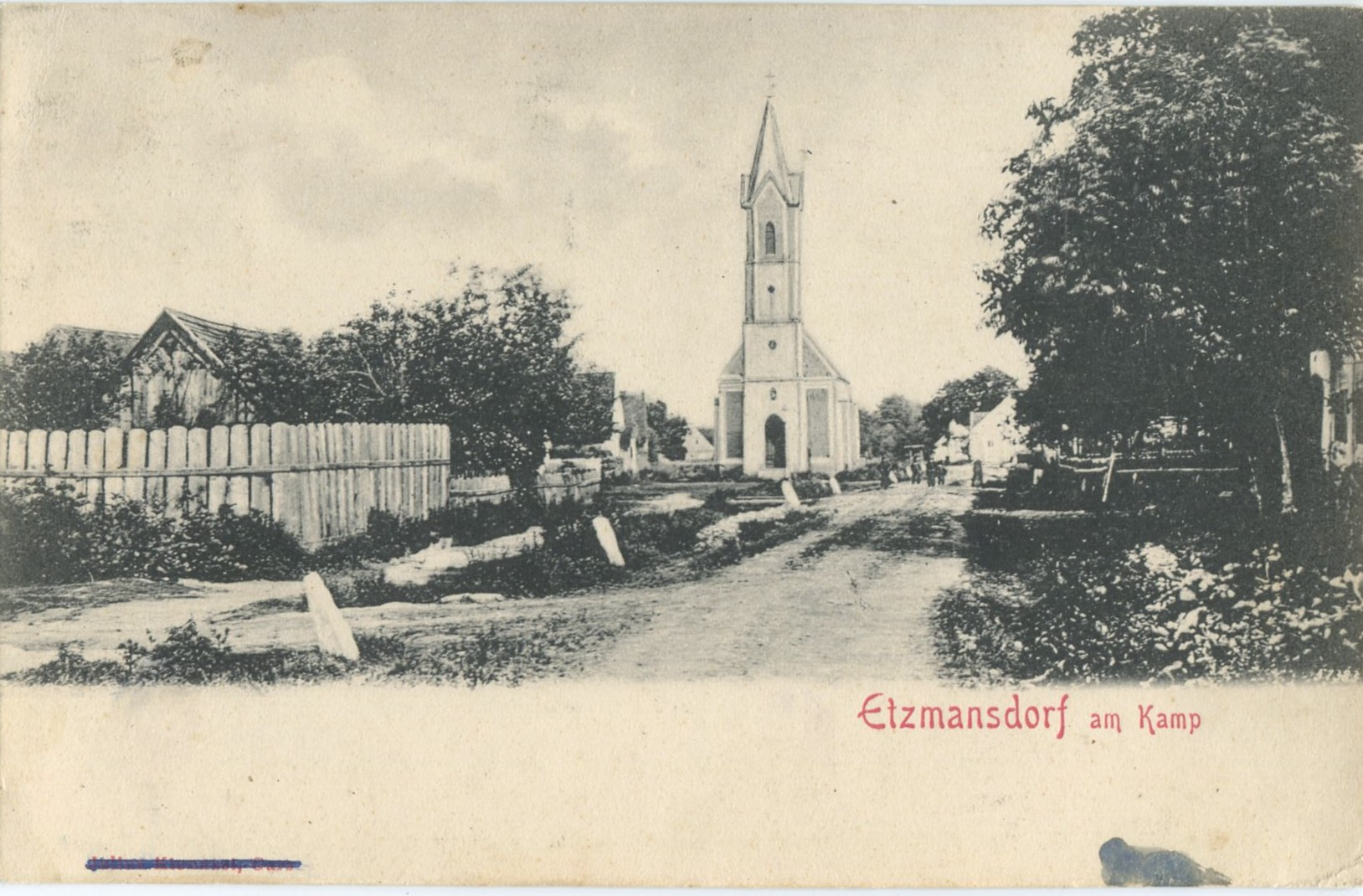 Etzmannsdorf am Kamp. Ansichtskarte um 1910